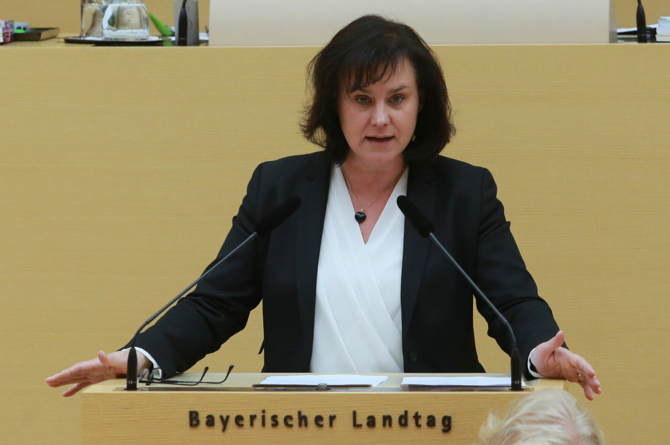 Ute Eiling-Hütig, deutsche Politikerin (CSU) und Bayerische Landtagsabgeordnete. Hier am 24. Januar 2017 während der aktuellen Stunde des Landtags zum Thema "Mobilisierung der Demokratie: Politische Bildung stärken!"